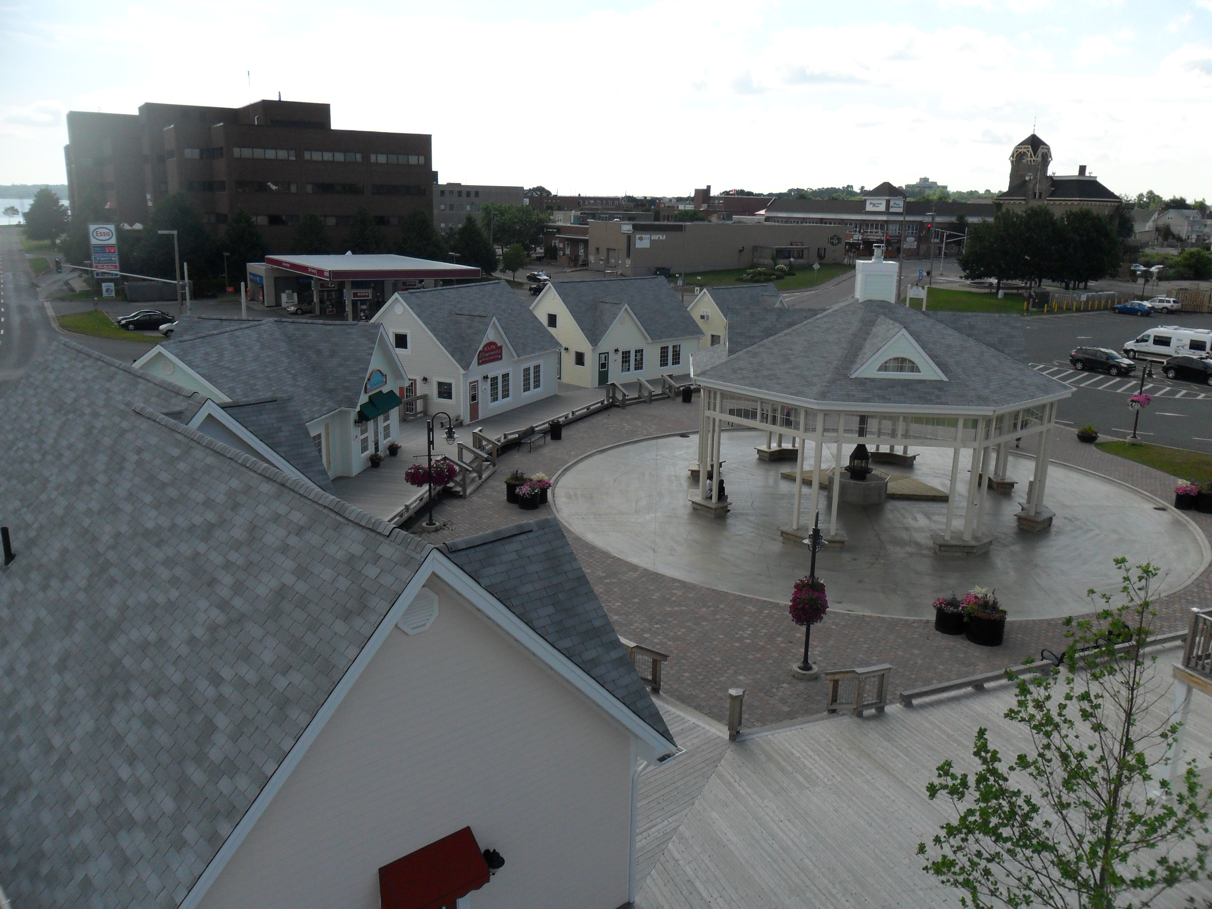 Promenade Waterfront, situé dans la ville de Bathurst au Nouveau-Brunswick